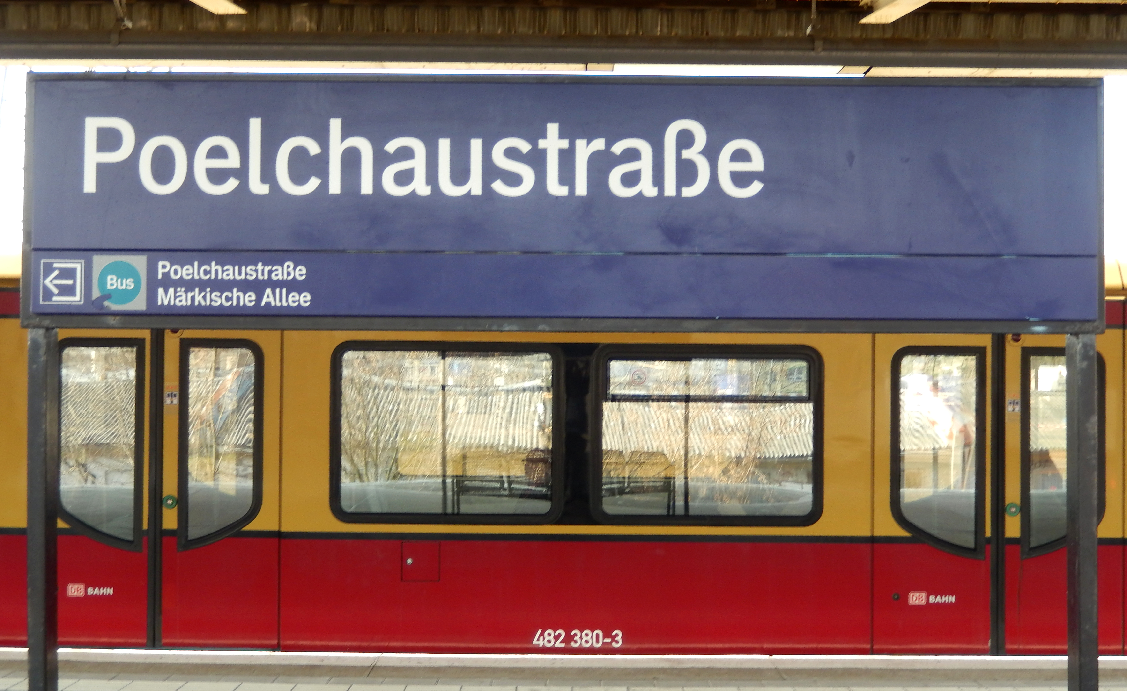 S-Bahnhof Poelchaustraße in Berlin-Marzahn, Stationstafel mit S-Bahn im Hintergrund